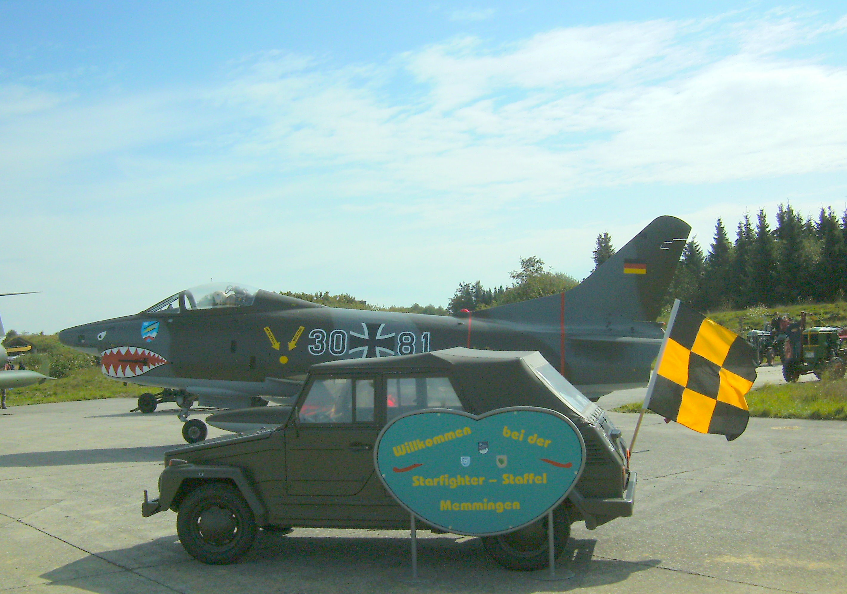 Tag der offenen Tür Allgäu Airport 2008 - Fiat G 31